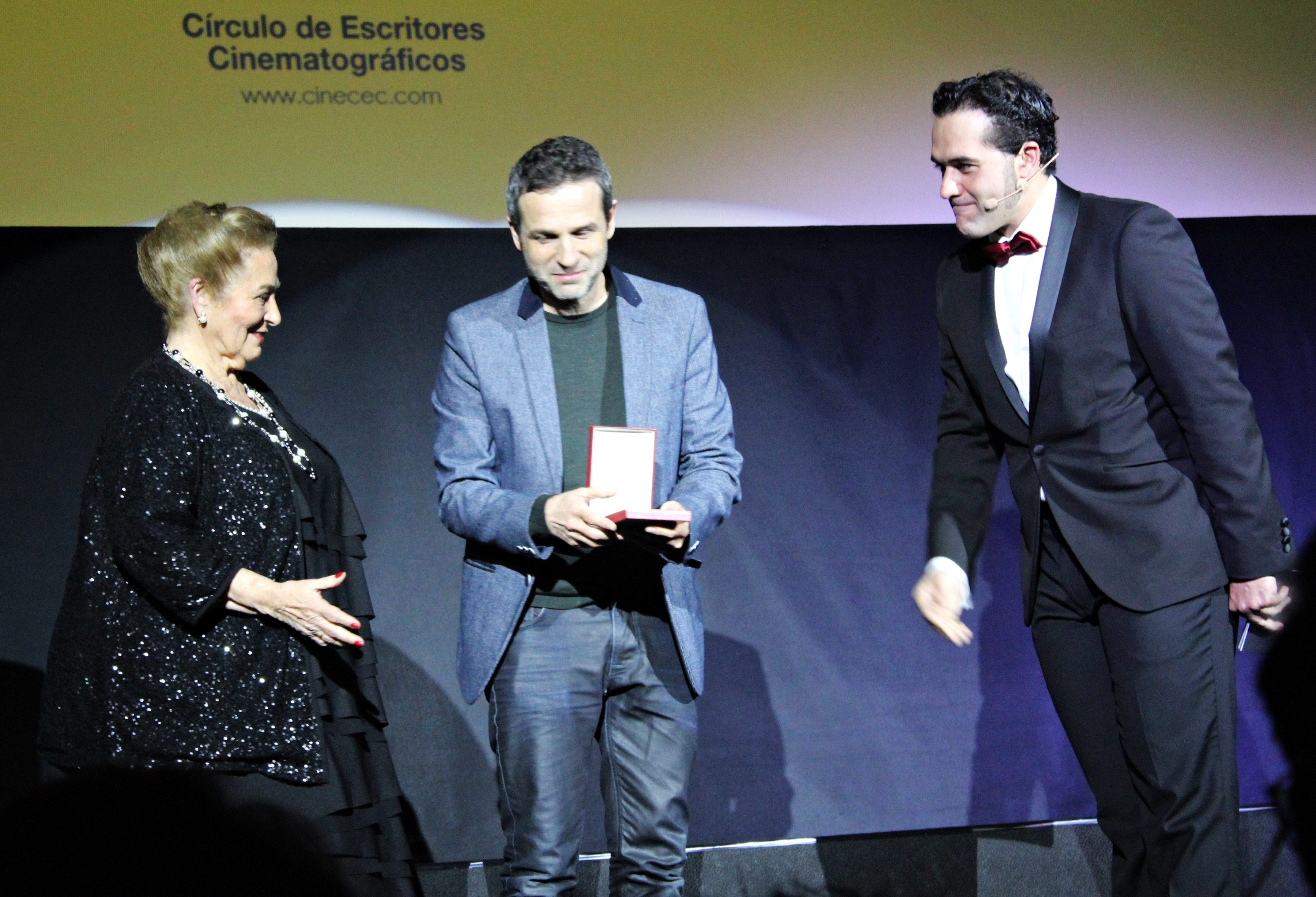 El director español Gustavo Salmerón, acompañado de su madre Julita, recibe la Medalla del Círculo de Escritores Cinematográficos al mejor largometraje documental de manos del también actor, guionista y director Alfonso Sánchez.